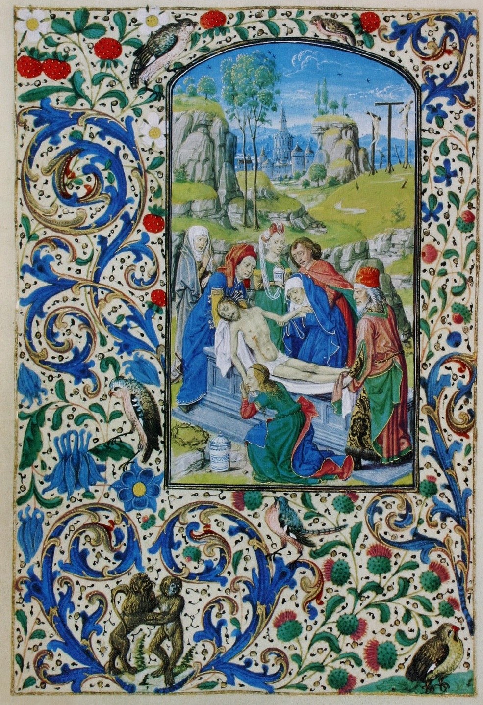 Wien, Österreichische Nationalbibliothek, cod. 1857, Stundenbuch der Maria von Burgund. In: Franz Unterkirchner (Hrsg.): Das Stundenbuch der Maria von Burgund. Codex Vindobonensis 1857 der Österreichischen Nationalbibliothek (Glanzlichter der Buchkunst), Darmstadt 1993.